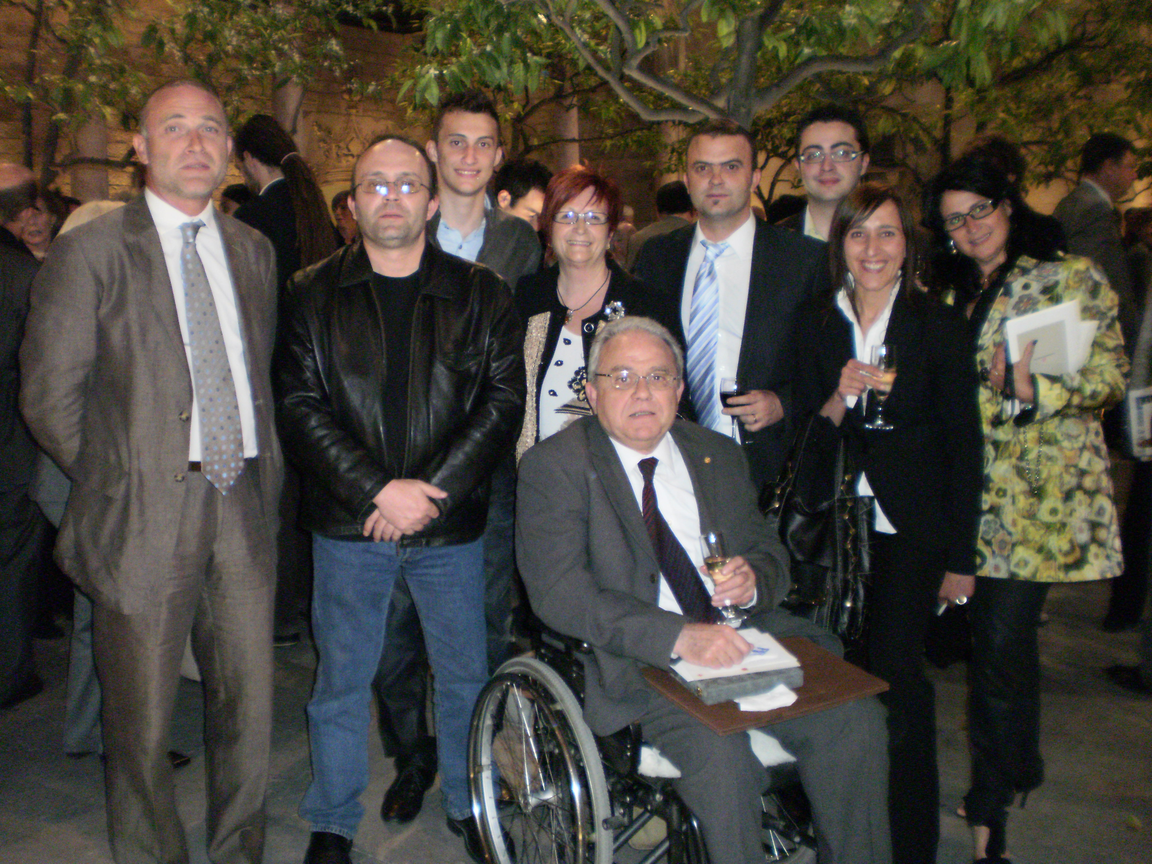 Manuel López Lozano, en en centro, junto a su familia, en la entrega de la Creu de Sant Jordi 2010